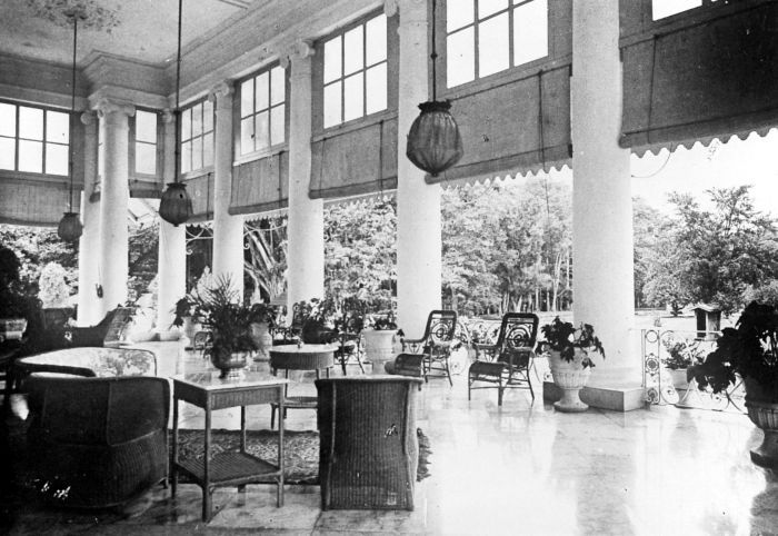 Repronegatief. Achtergalerij van het paleis van de Gouverneur Generaal, Buitenzorg.